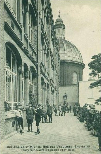 Collège Saint Michel des Pères Jésuites à la Rue des Ursulines (Bruxelles), aujourd'hui Sint-Jan Berchmanscollege